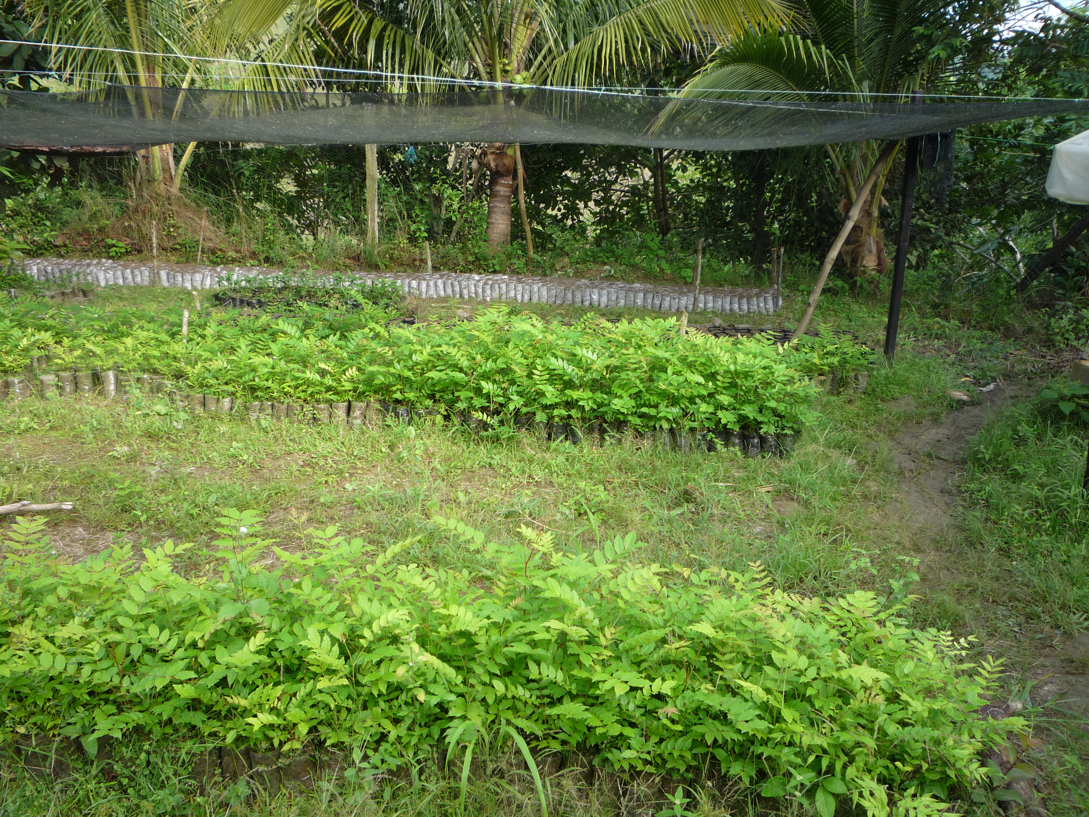 Semillero, Cedro Rosado cultivo familiar